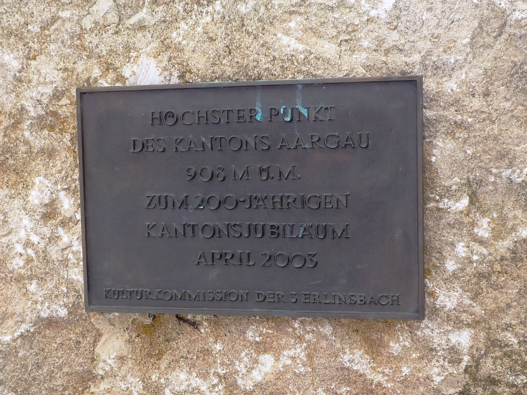 Geissfluegrat - Tafel auf Gipfelstein